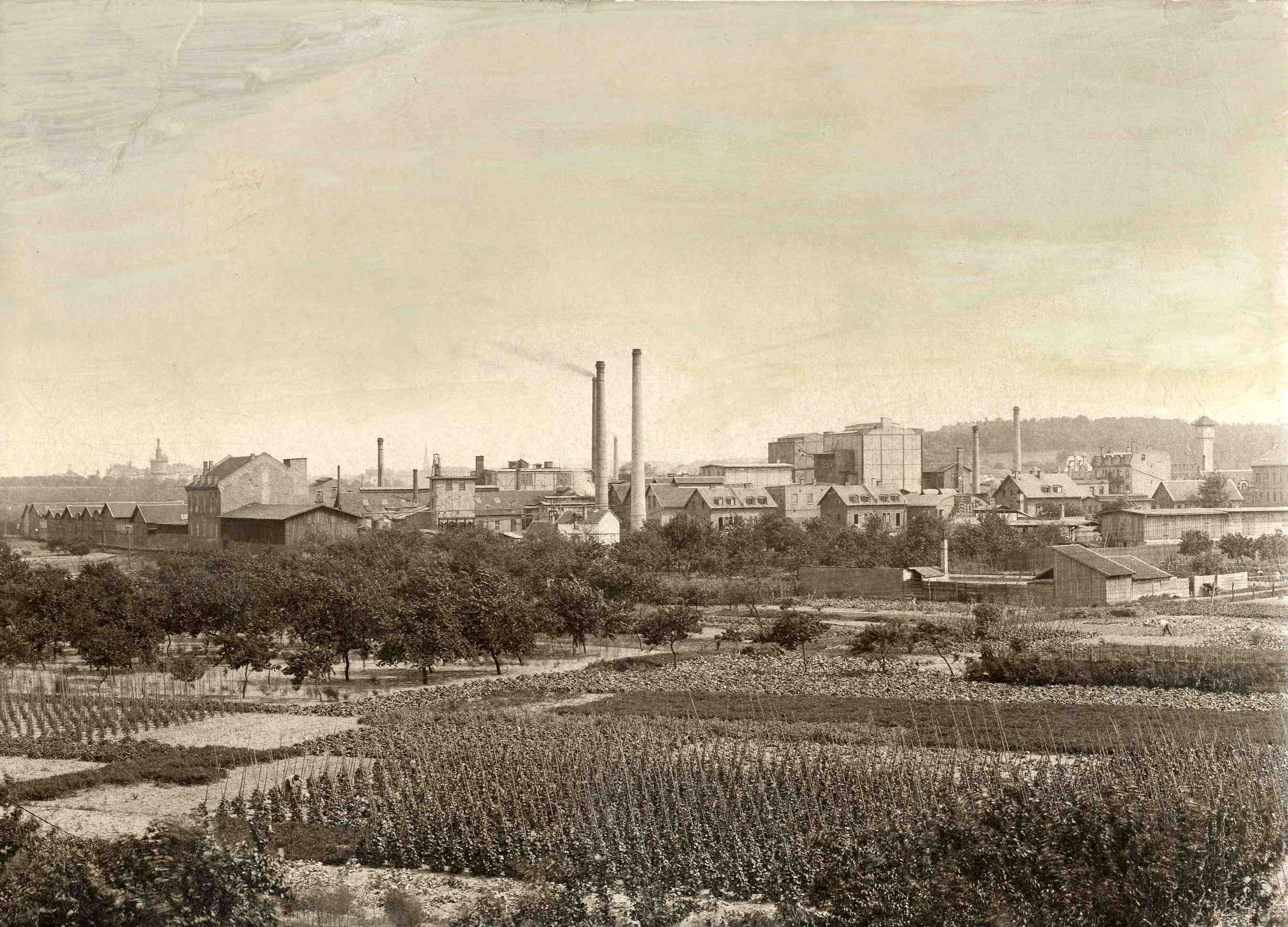 Ansicht des Chemiewerkes in Mombach um 1900. Im Vordergrund sieht man die typischen Mombacher Bohnenfelder. Die heute angrenzenden Ortschaft war damals noch in großem Abstand.